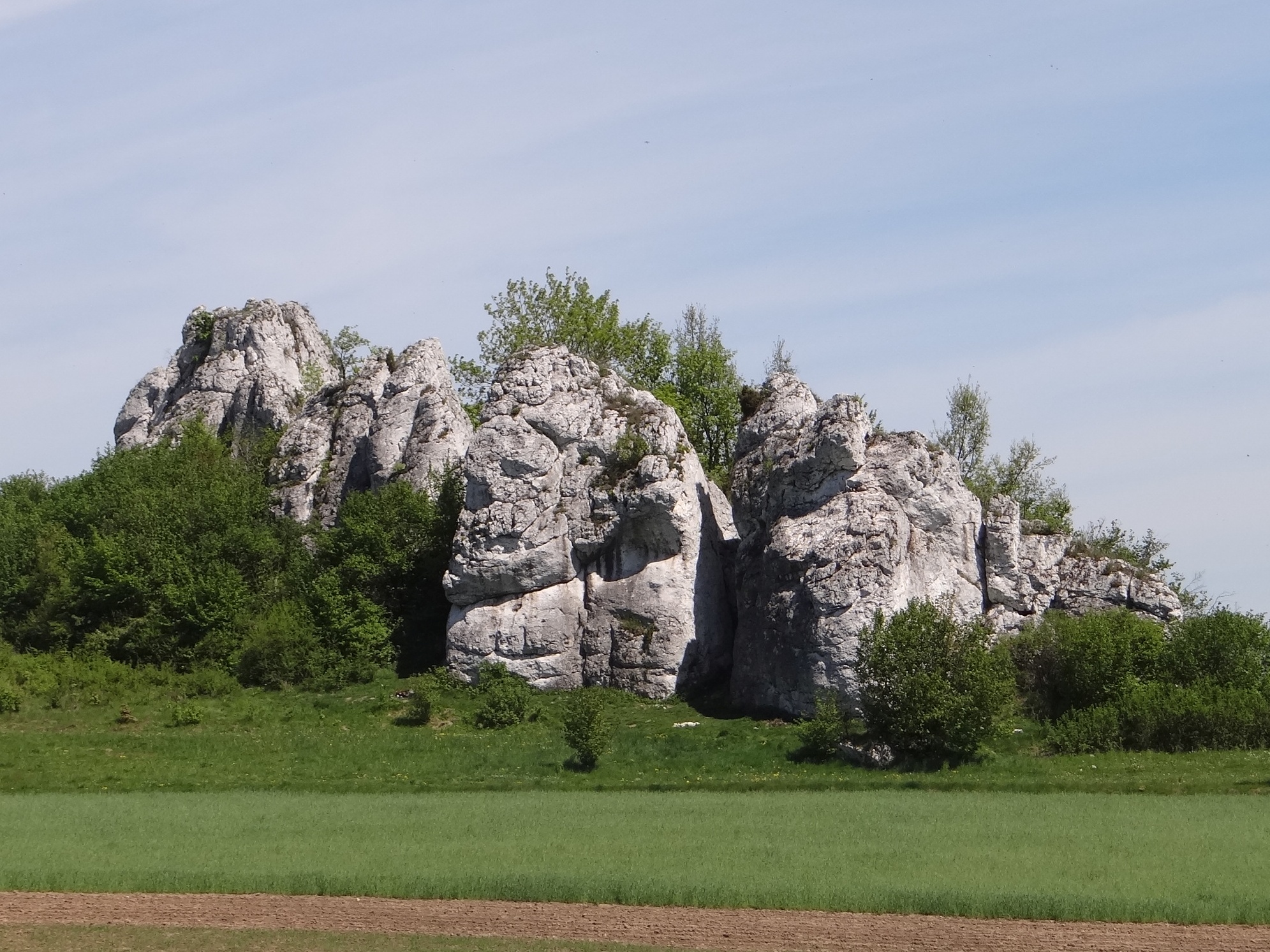 Sokołowe Cyrki